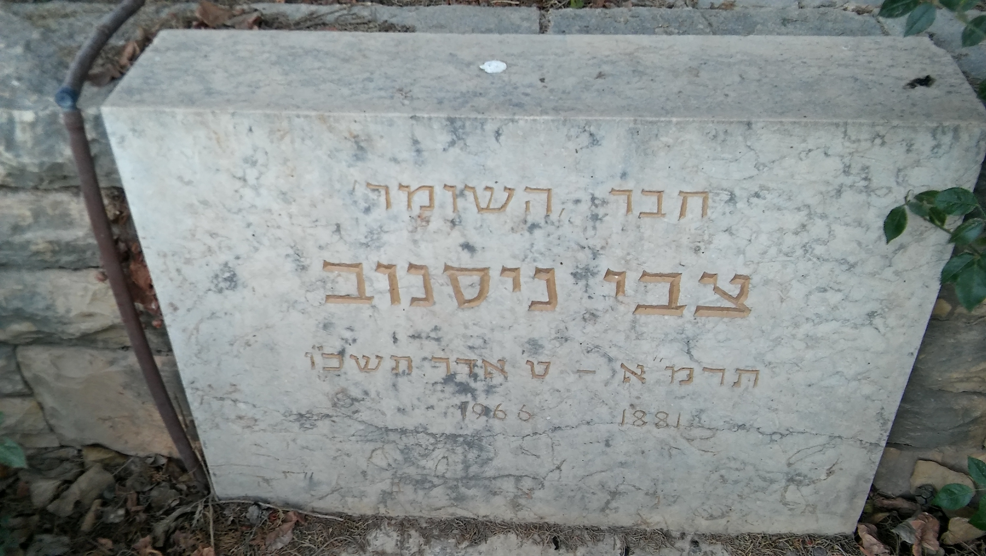 קברו של צבי ניסנוב בחלקת השומר בבית הקברות של כפר גלעדי